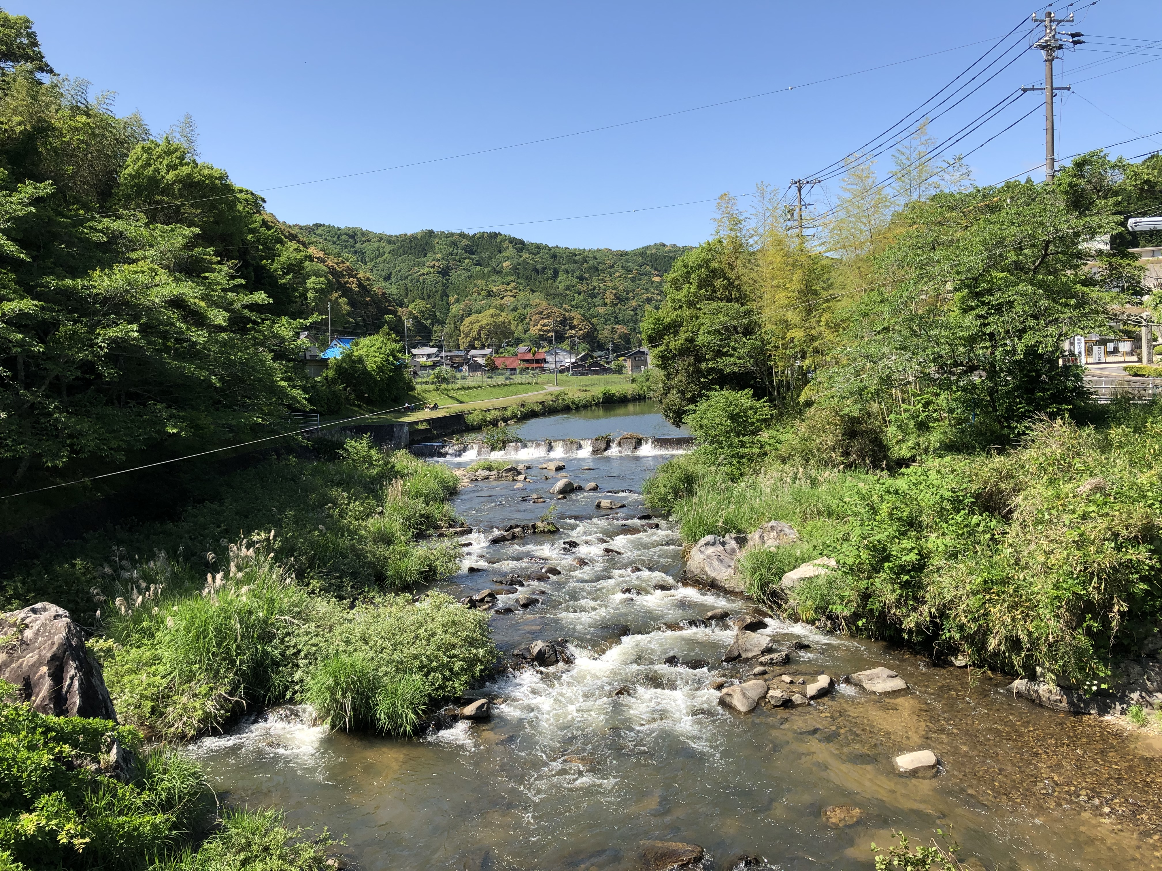 乙川。川の左側は才栗町。右側は秦梨町。